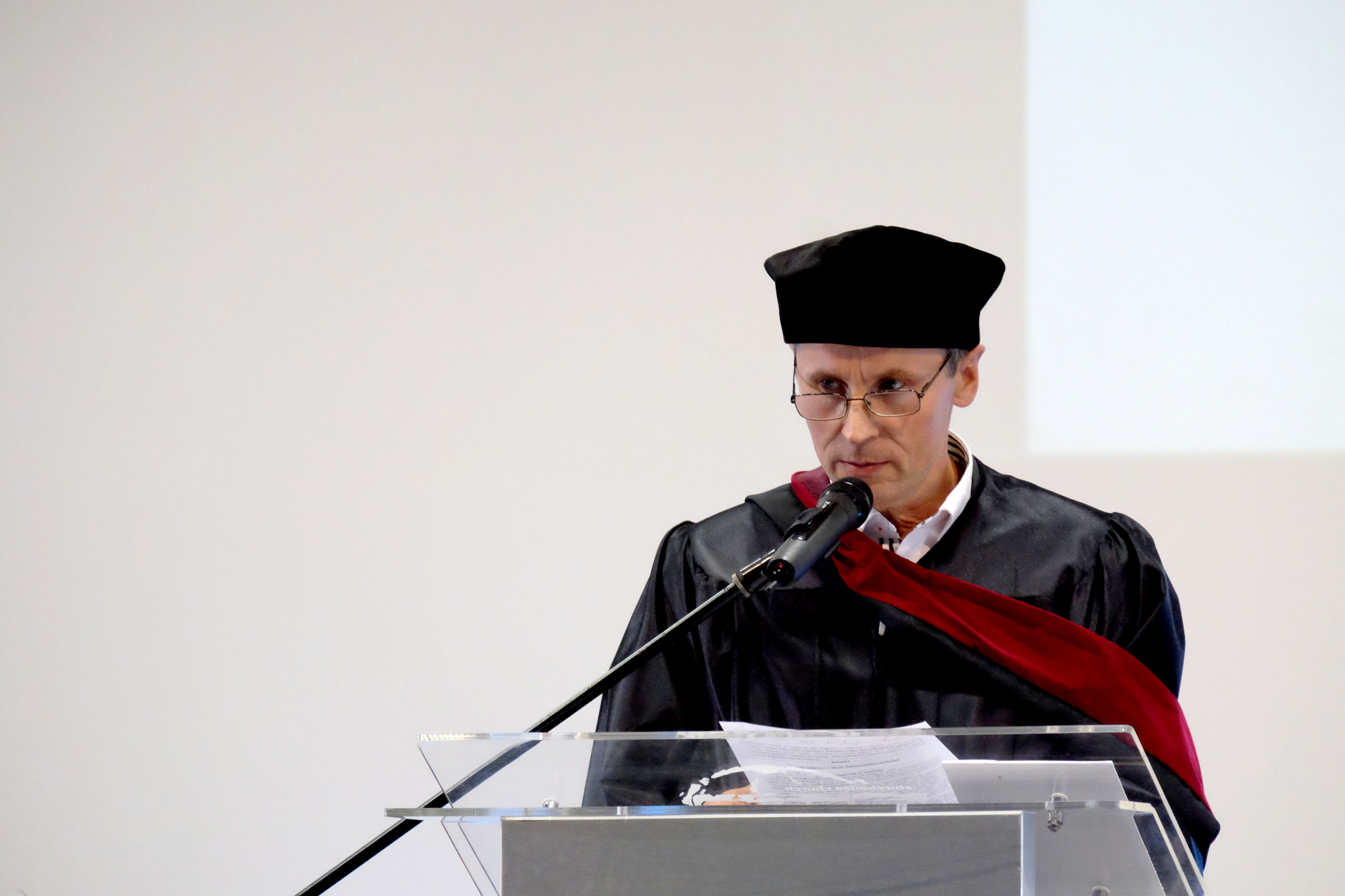 Jan Mironczuk – polski historyk, doktor habilitowany nauk humanistycznych w zakresie historii